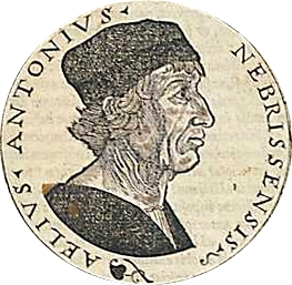 Retrato de Antonio de Nebrija, extraído de la portada del "Dictionarium" en la edición impresa en Granada en 1536 sus hijos. Xilografía atribuida a Antonio Ramiro, natural de Écija, grabador principal de la imprenta de los hijos de Nebrija